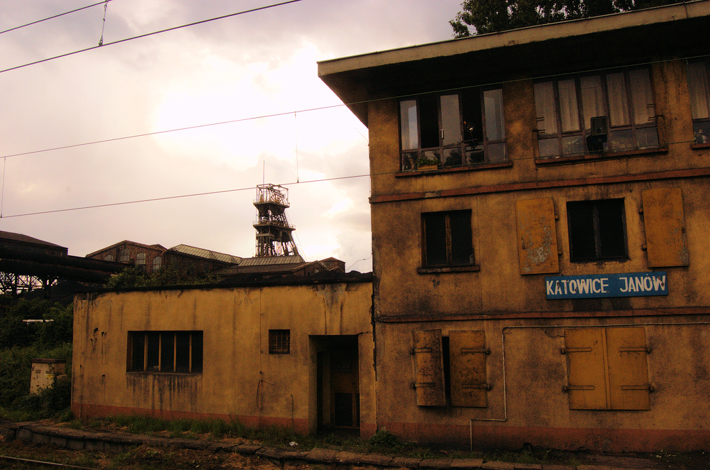 Stacja kolejowa Katowice Janów